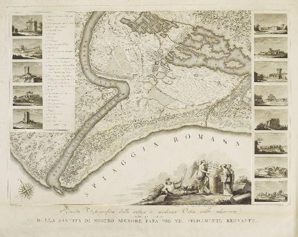 Carta topografica di Ostia antica e moderna, stampa, 82.2 x 56.8 cm, Crema, Museo Civico